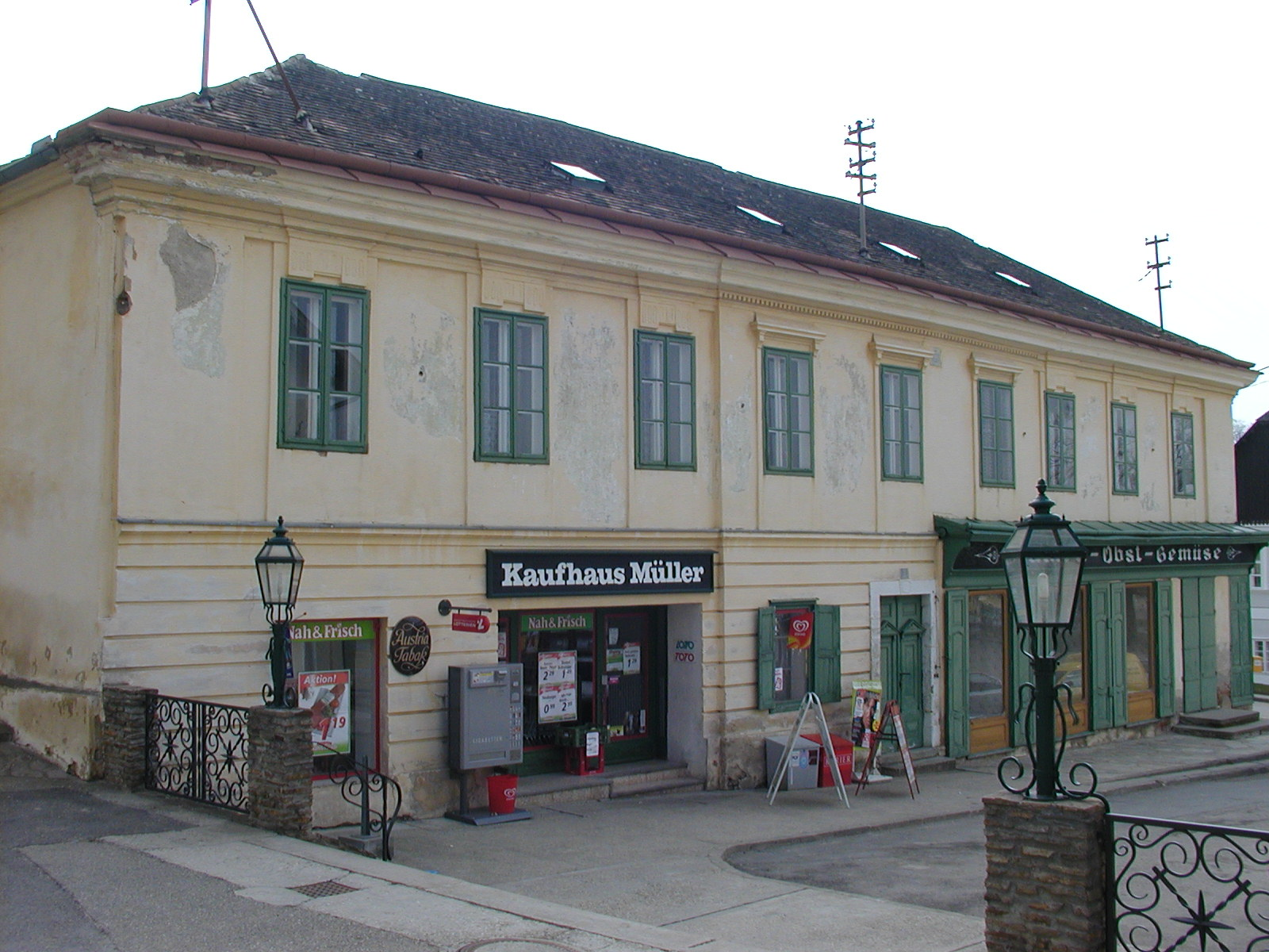 Sitzendorf Hauptplatz 3